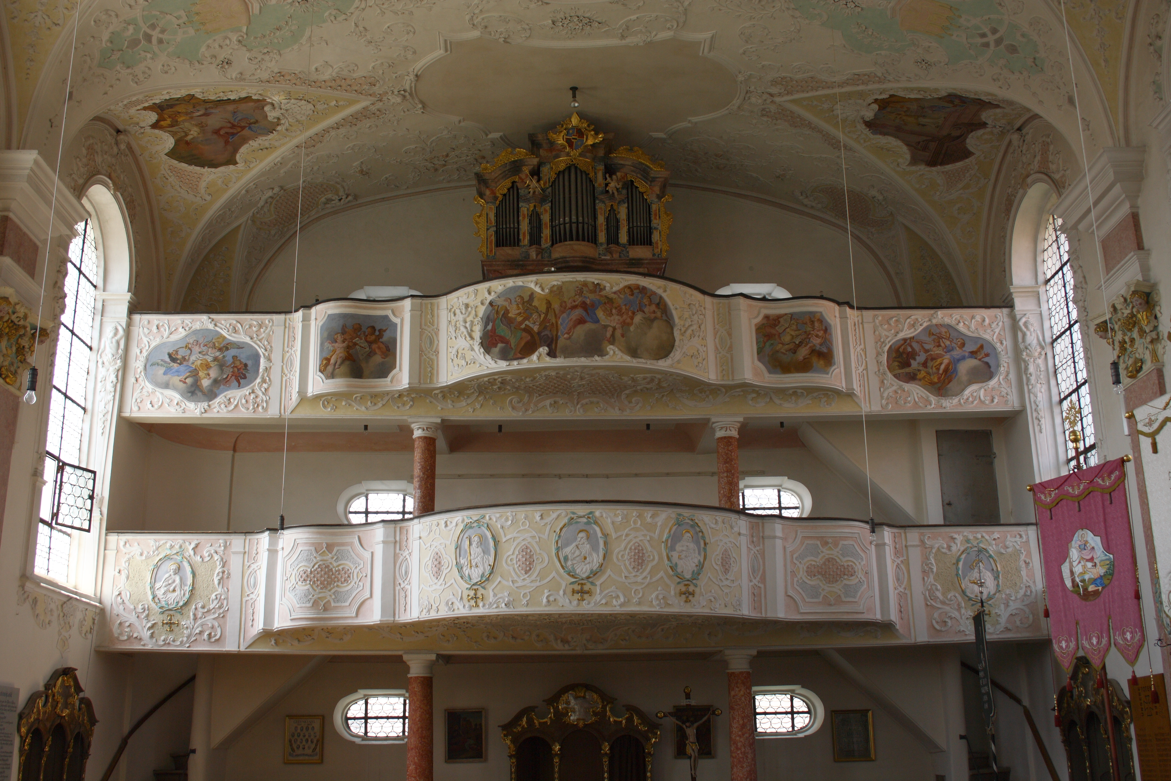 Orgel der Katholische Pfarrkirche St. Martin in Deubach, einem Stadtteil von Ichenhausen im Landkreis Günzburg (Bayern), 1739/40 von Johann Martin Kraemer errichtet, Orgelempore, Stuckdekor, wohl von Johann Martin Kraemer, Doppelempore